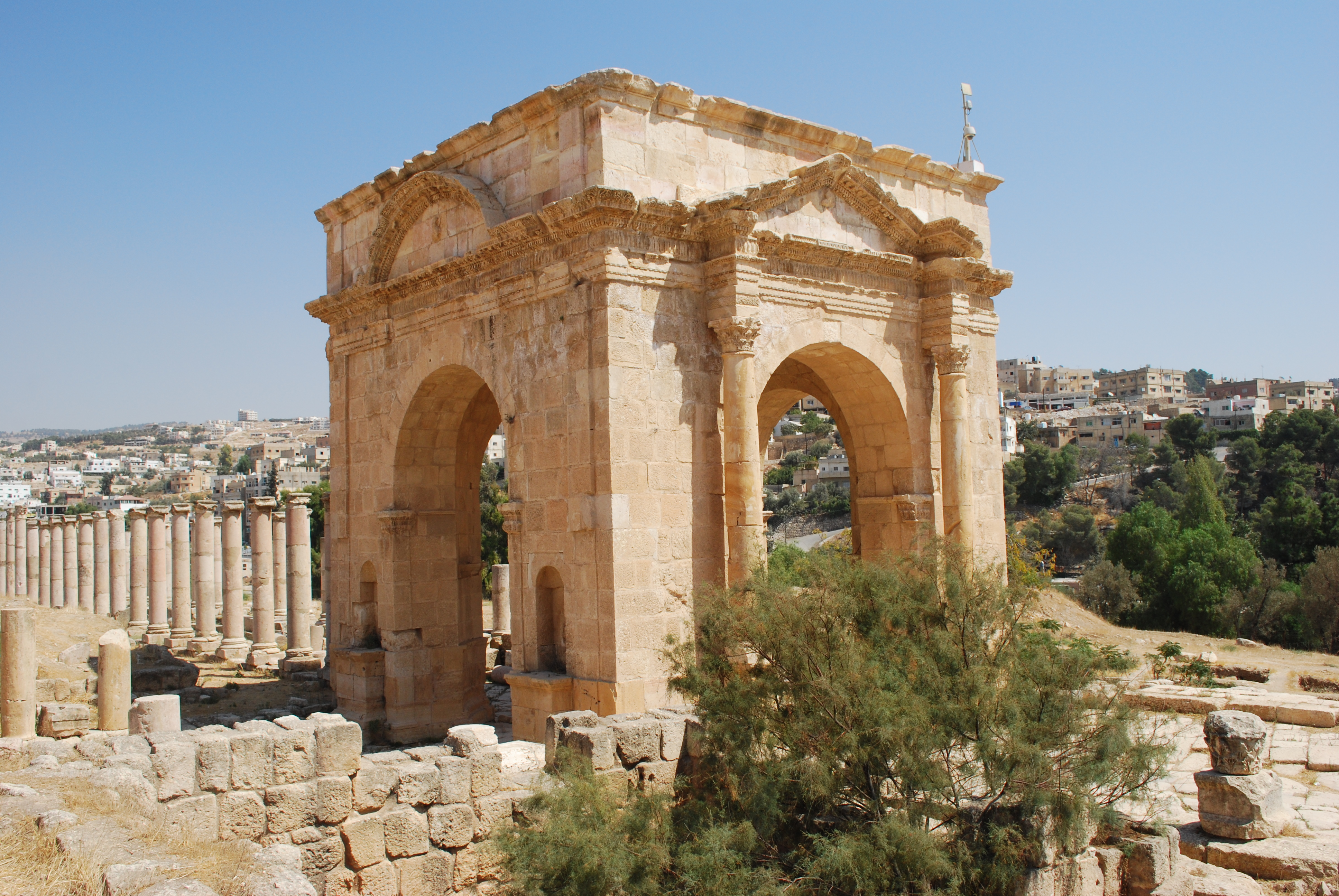 Le tétrapyle nord de Jerash.